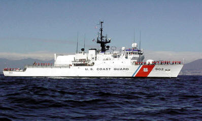 USCGC Tampa WMEC-902.